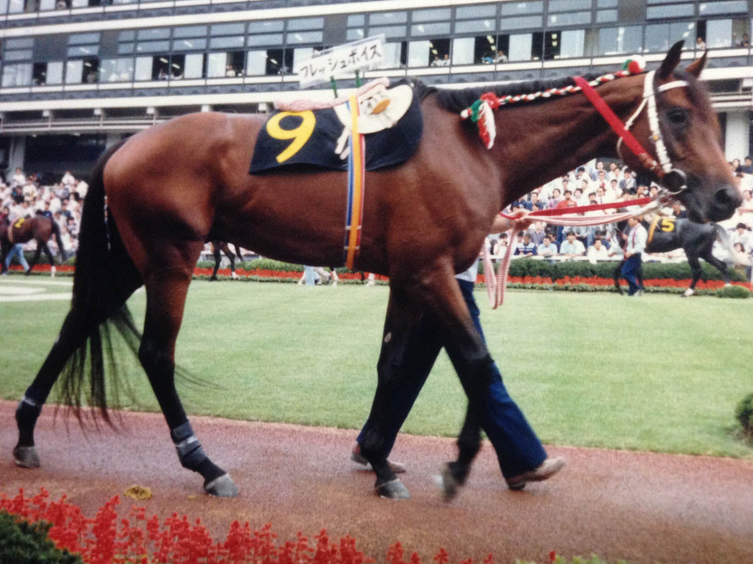 1987年9月20日、中山競馬場